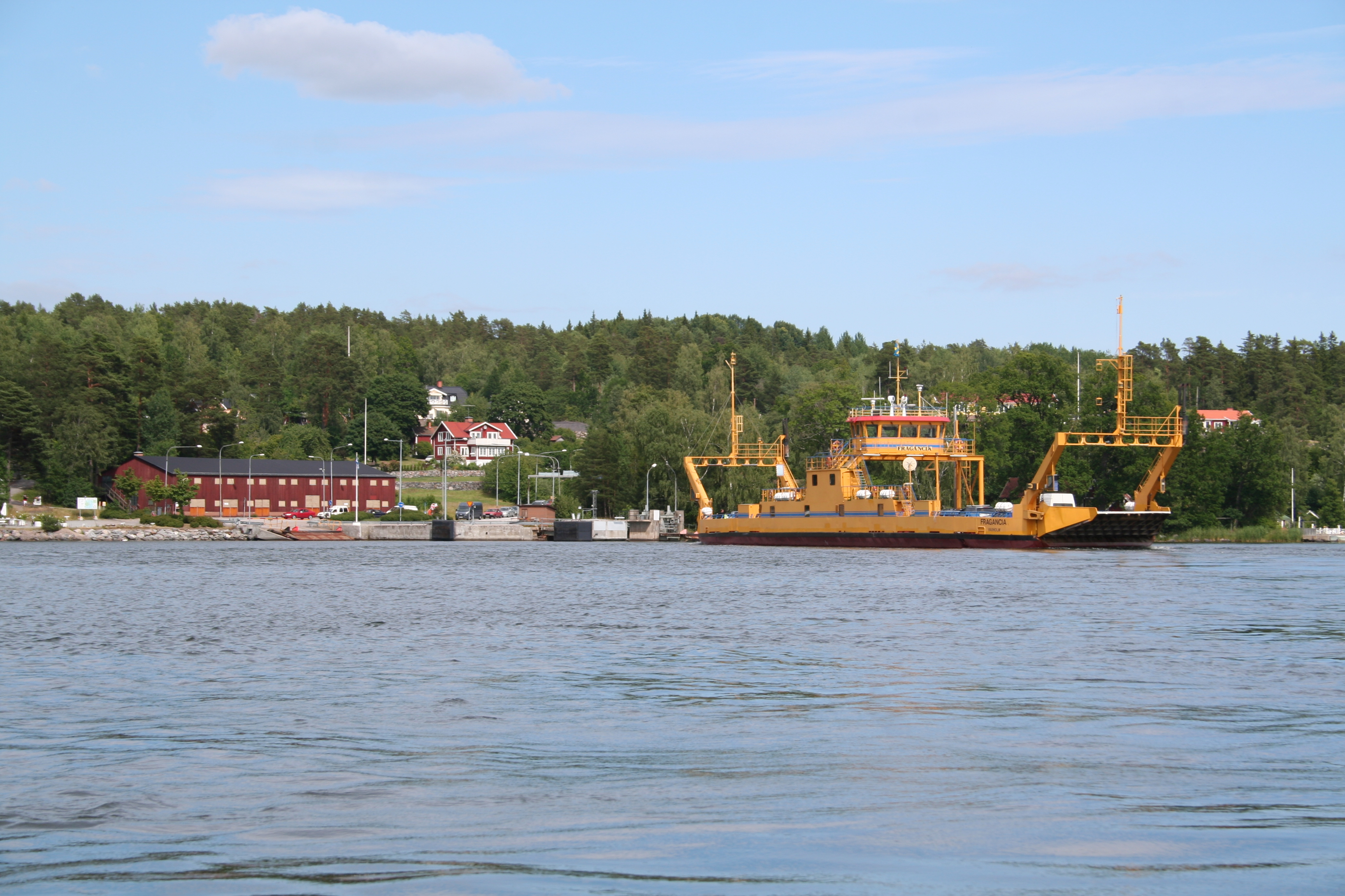 Färjeläget vid Stenslätten på Värmdö. Källa: eget foto, fotograf EnDumEn juli 2008